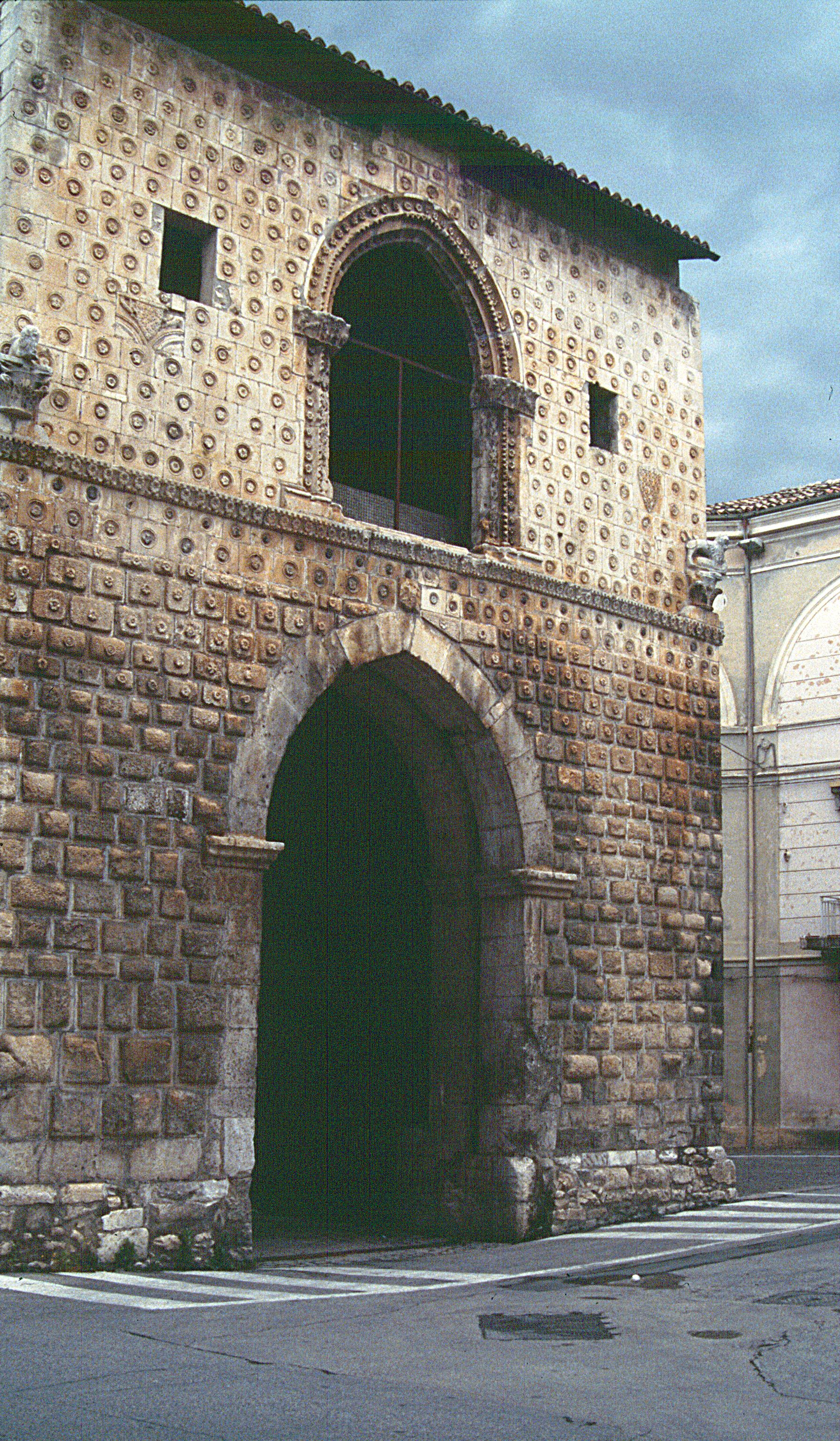 Sulmona, Porta Napoli (1338).